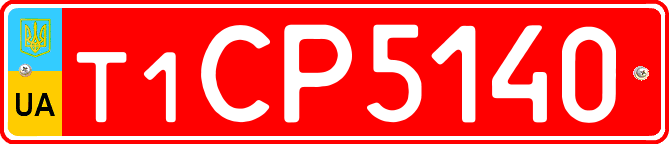 Транзитный дилерский автомобильный номерной знак Украины, с 2006 года